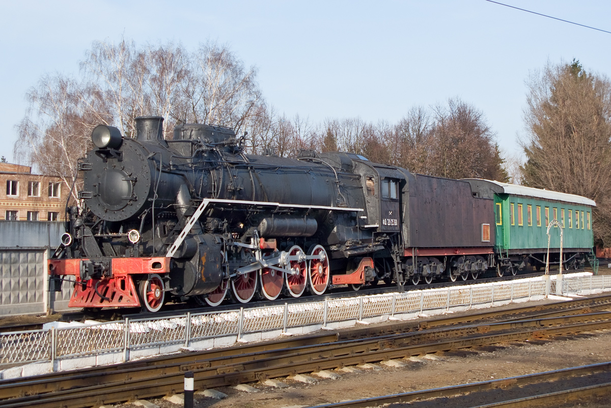 Паровоз ФД20-2560